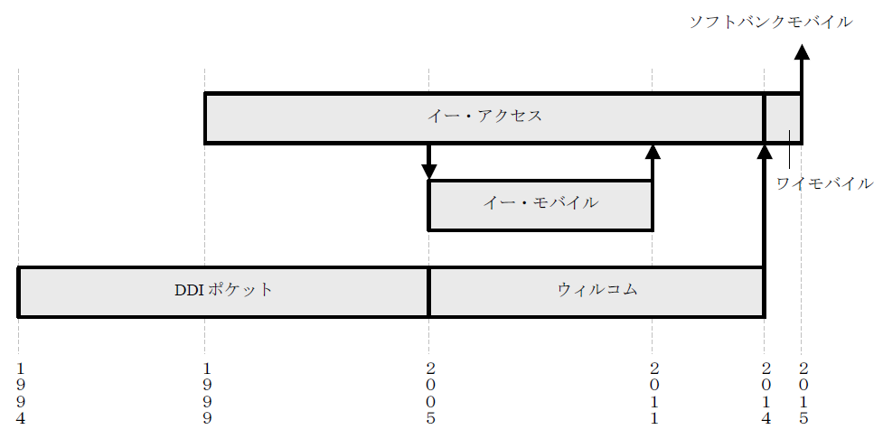 イー・アクセス, ワイモバイル, イー・モバイル, DDIポケット, ウィルコム が KADOKAWA に吸収合併されるまでの統廃合を時系列順に整理した図